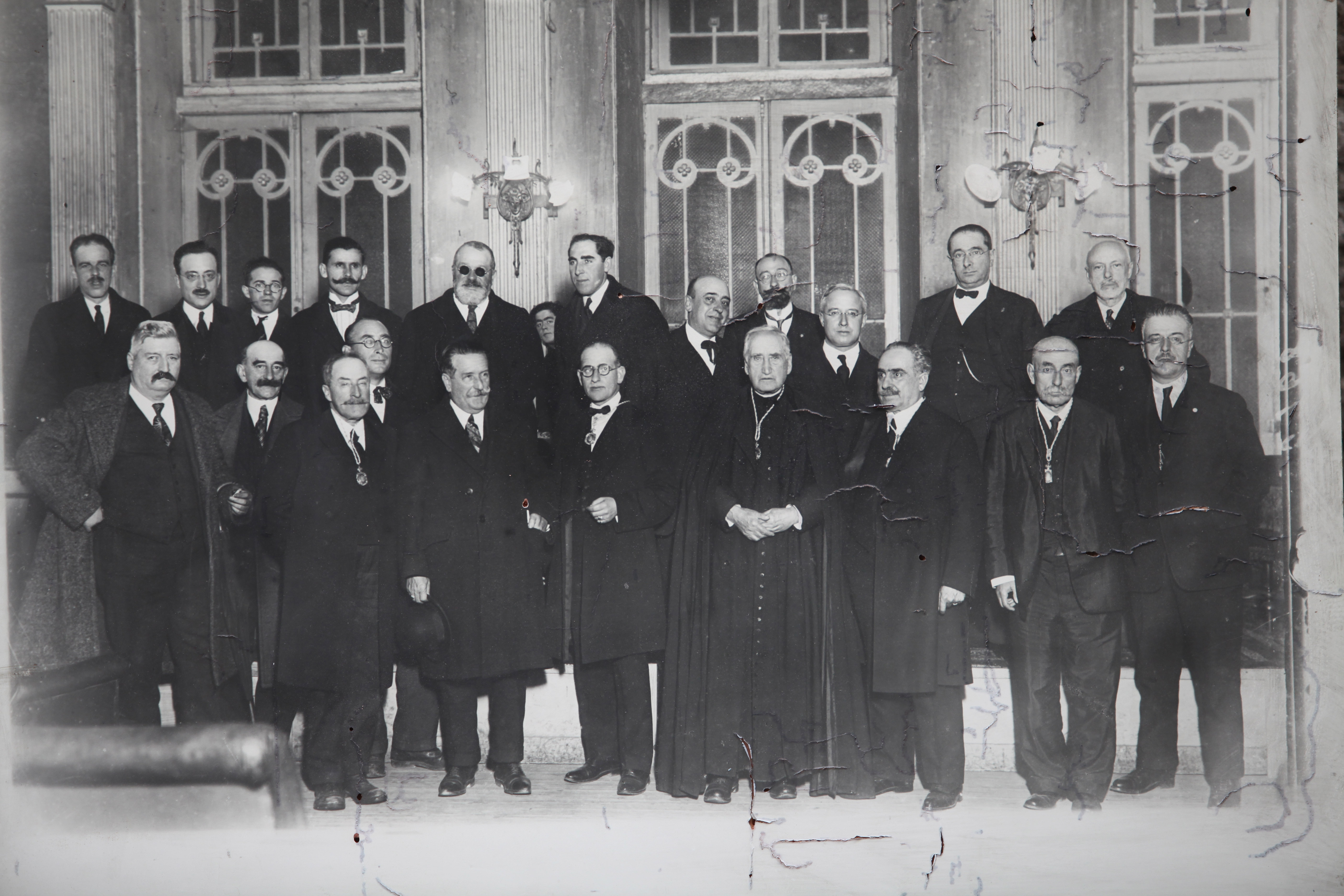 Elección de Eladio Rodríguez como presidente da Real Academia Galega, A Coruña, 20 de novembro de 1926. Fotografía en Vida Gallega